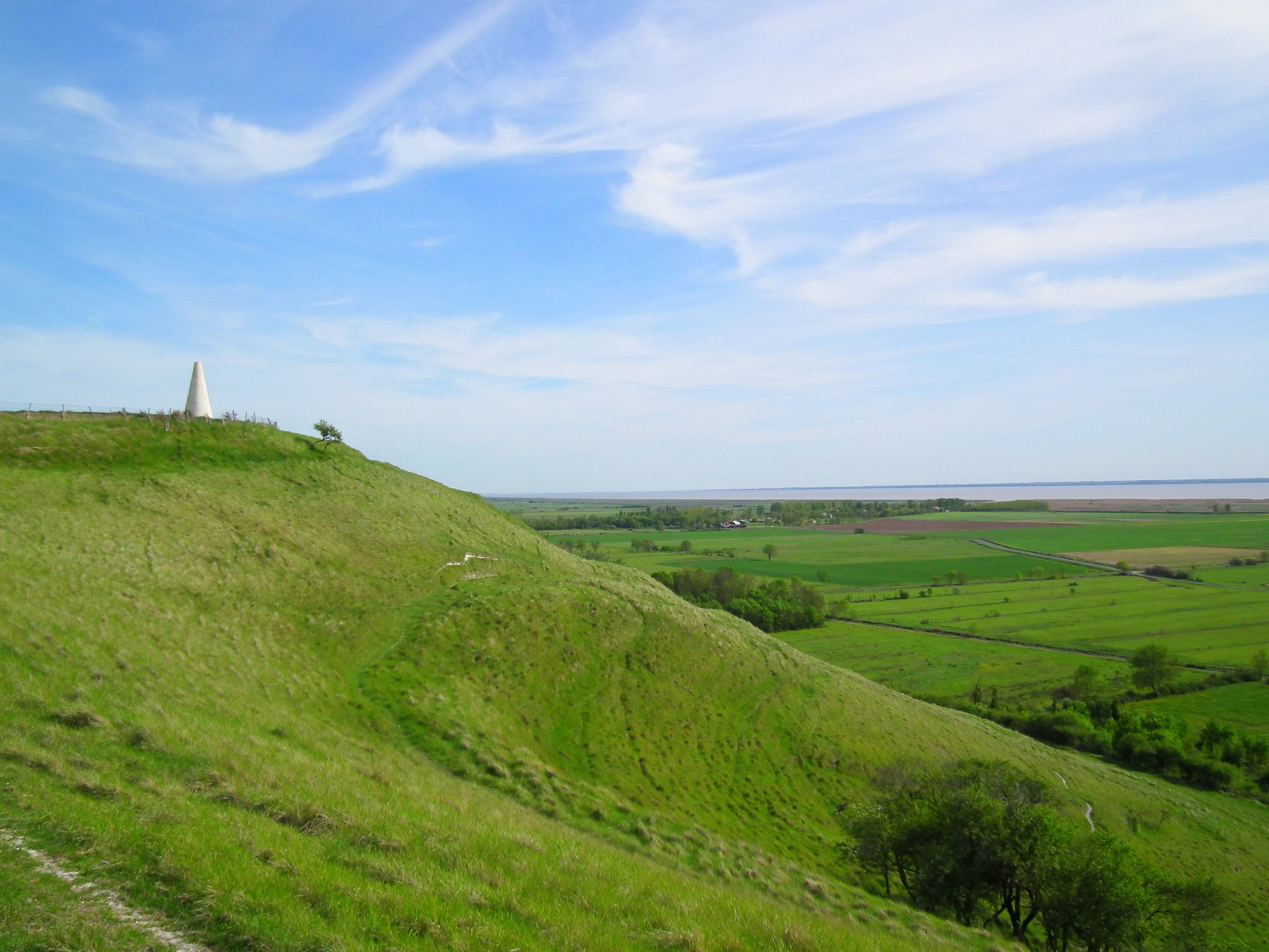 Le Terrier de Beaumont (communes de Saint-Fort-sur-Gironde et Saint-Romain-sur-Gironde)